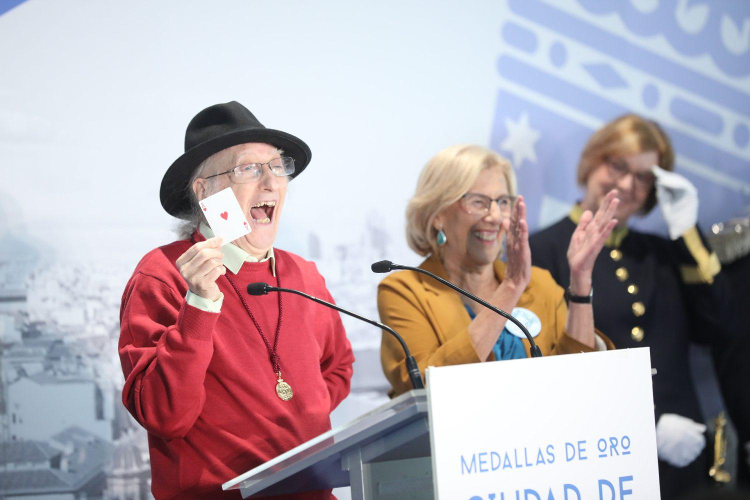 La alcaldesa de Madrid, Manuela Carmena, ha entregado esta mañana, como es tradicional en la festividad de San Isidro, las Medallas de Oro de Madrid, la distinción que otorga el Ayuntamiento de la capital a aquellas personas e instituciones que, además de haber destacado en sus respectivos campos, poseen una vinculación especial con la ciudad. Este año, los galardonados han sido la cantaora Carmen Linares, el cartomago e ilusionista Juan Tamariz, el pintor y dibujante Andrés Rábago ‘El Roto’ y la Mesa Estatal por el Blindaje de las Pensiones.